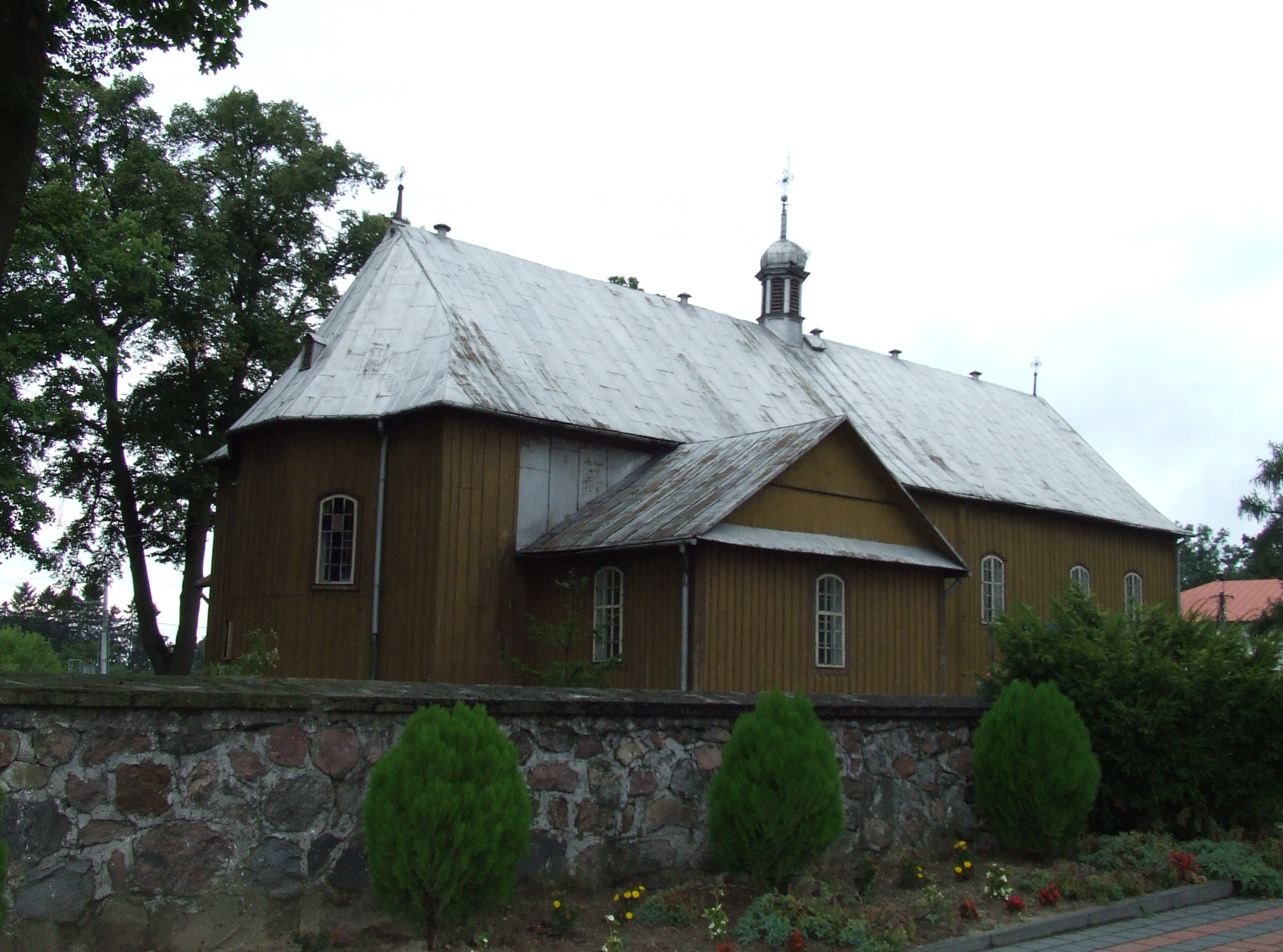 kościół par. p.w. Świętej Trójcy, drewn. Gończyce